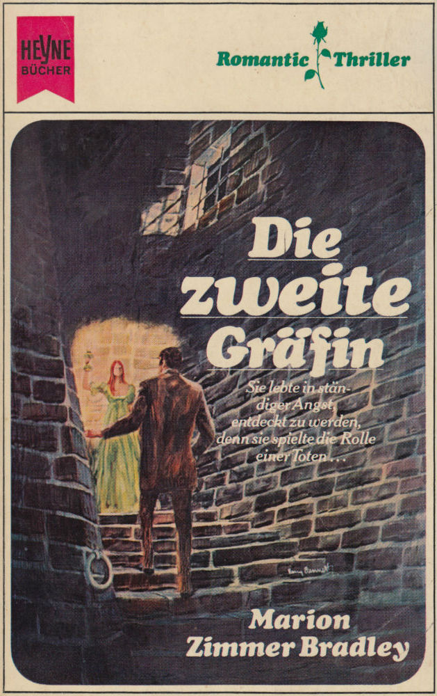 Marion Zimmer Bradley: Die zweite Gräfin. Heyne, München 1970. DNB